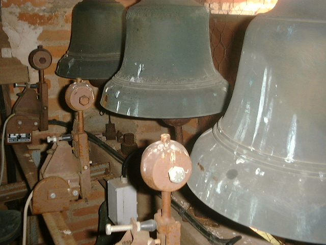 Electrotinteurs du carillon de ND de la Dreche près d'Albi